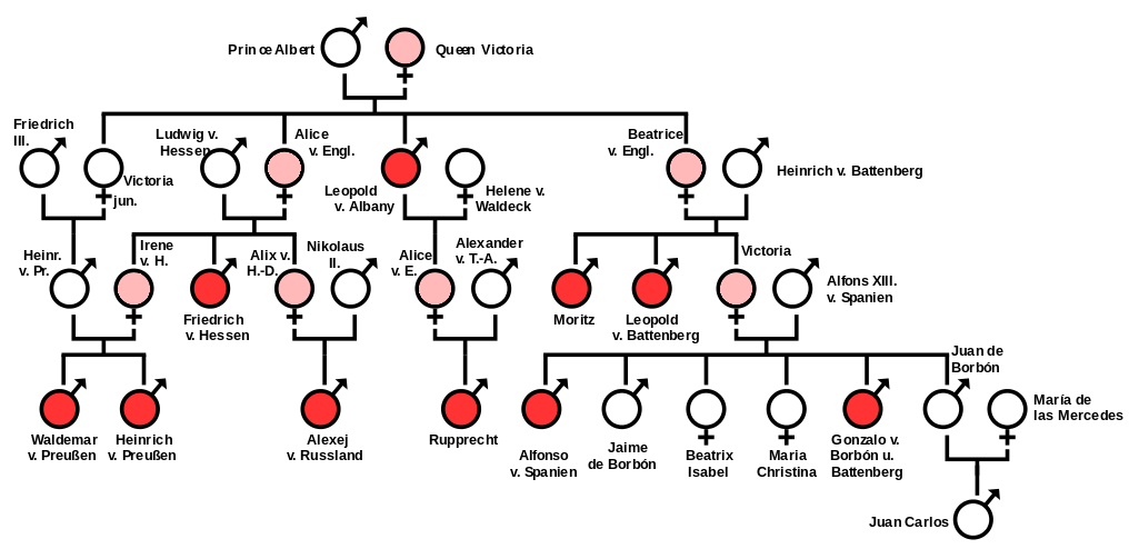 Gonosomal-rezessiver Erbgang der Bluterkrankheit bei den Nachkommen der Königin Victoria zur Stammbaumanalyse